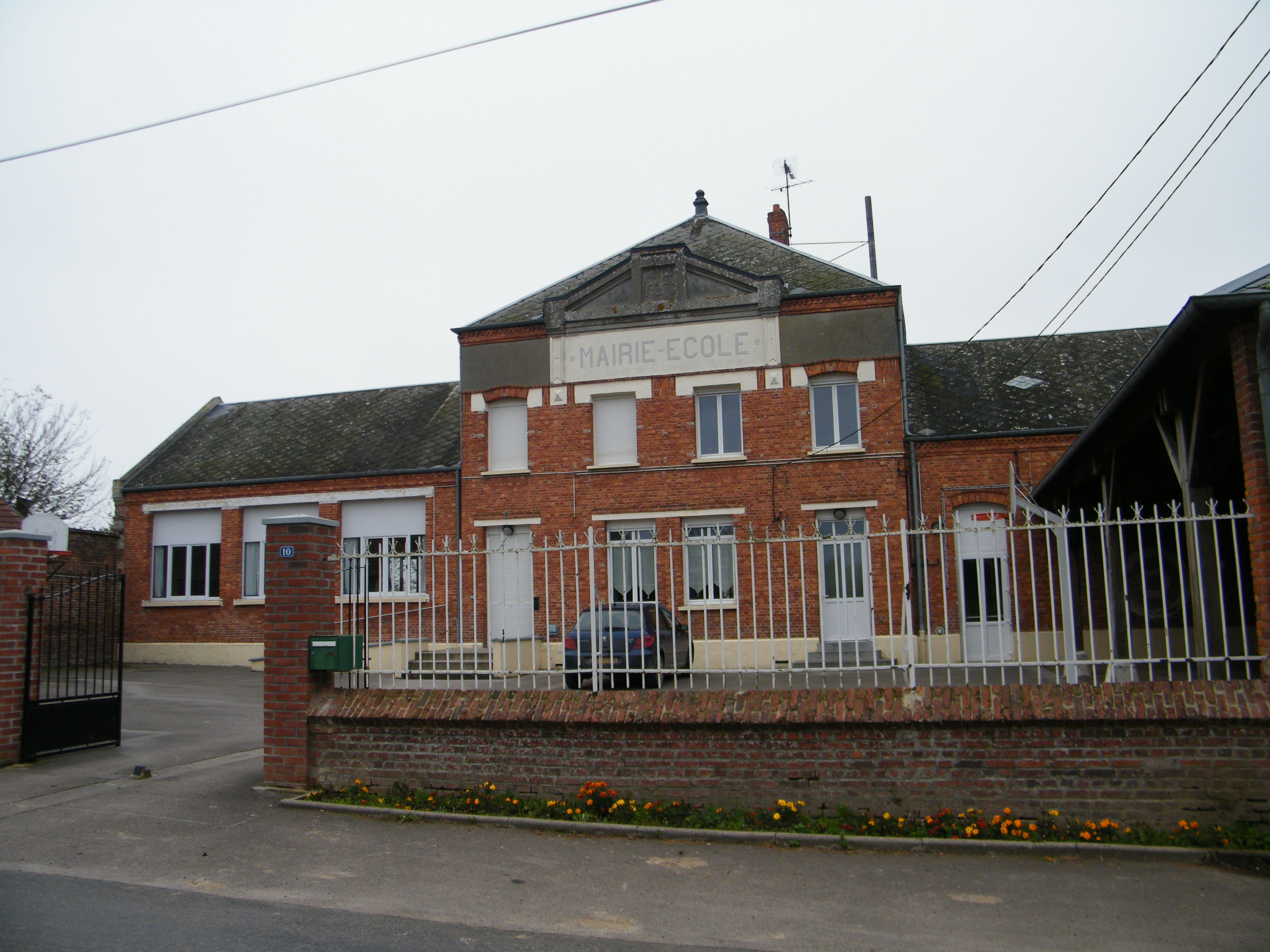 Bâtiments communaux.